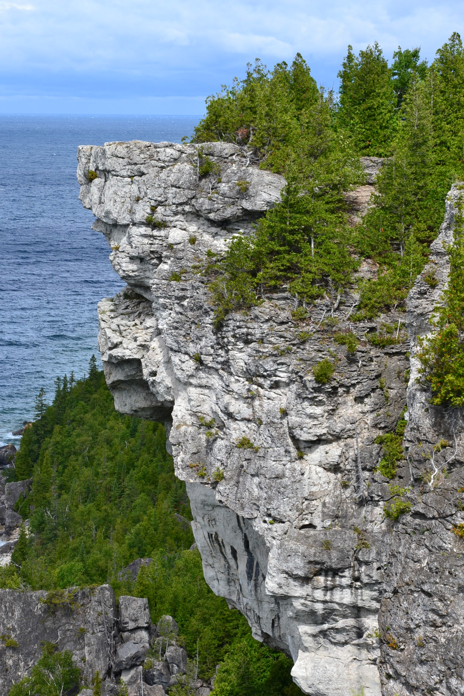 Formacja skalna w kształcie głowy lwa w Parku Lion's Head